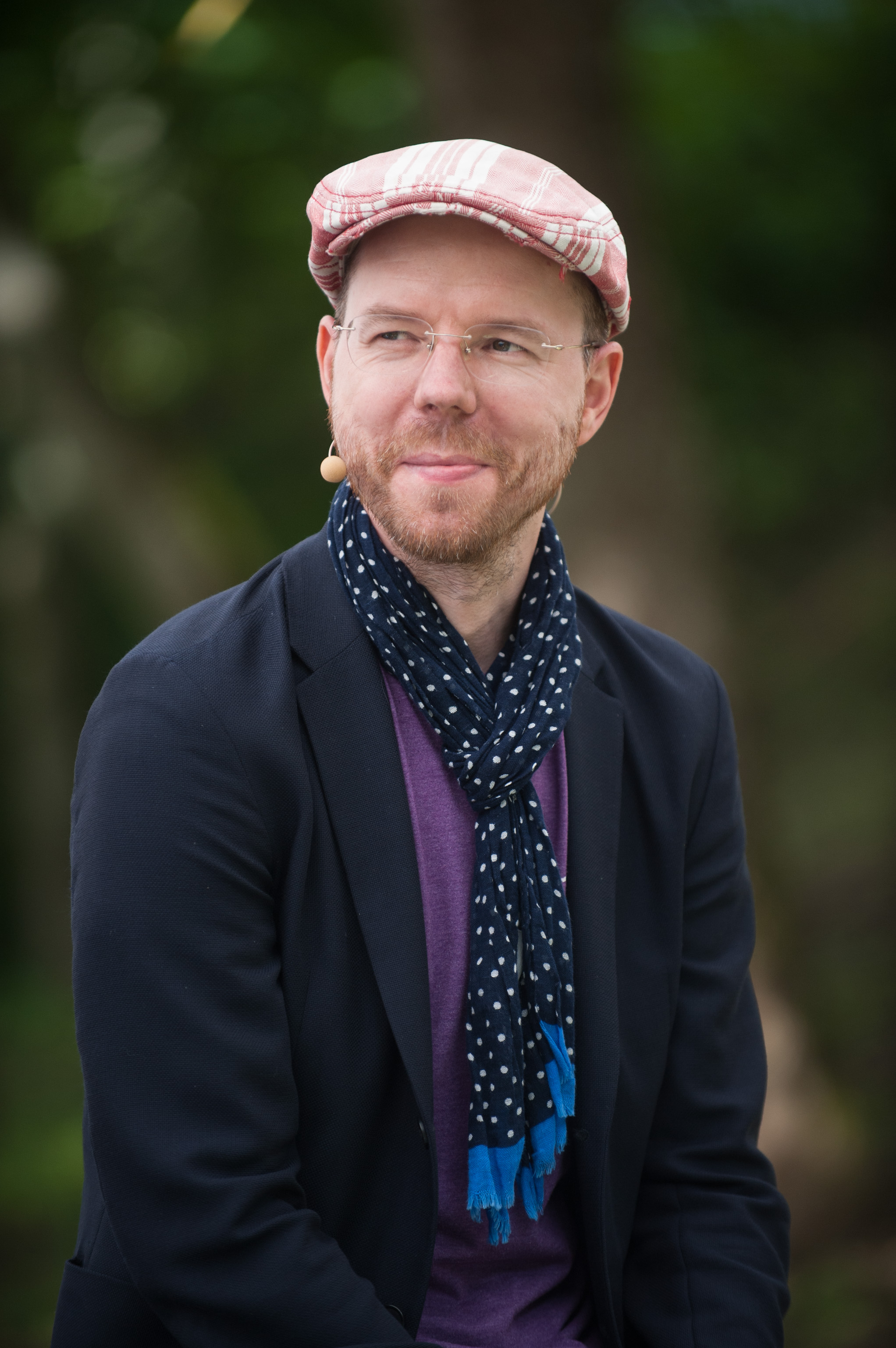 Arvamusfestival 2014: "Mis on riigi roll ettevõtluses?"